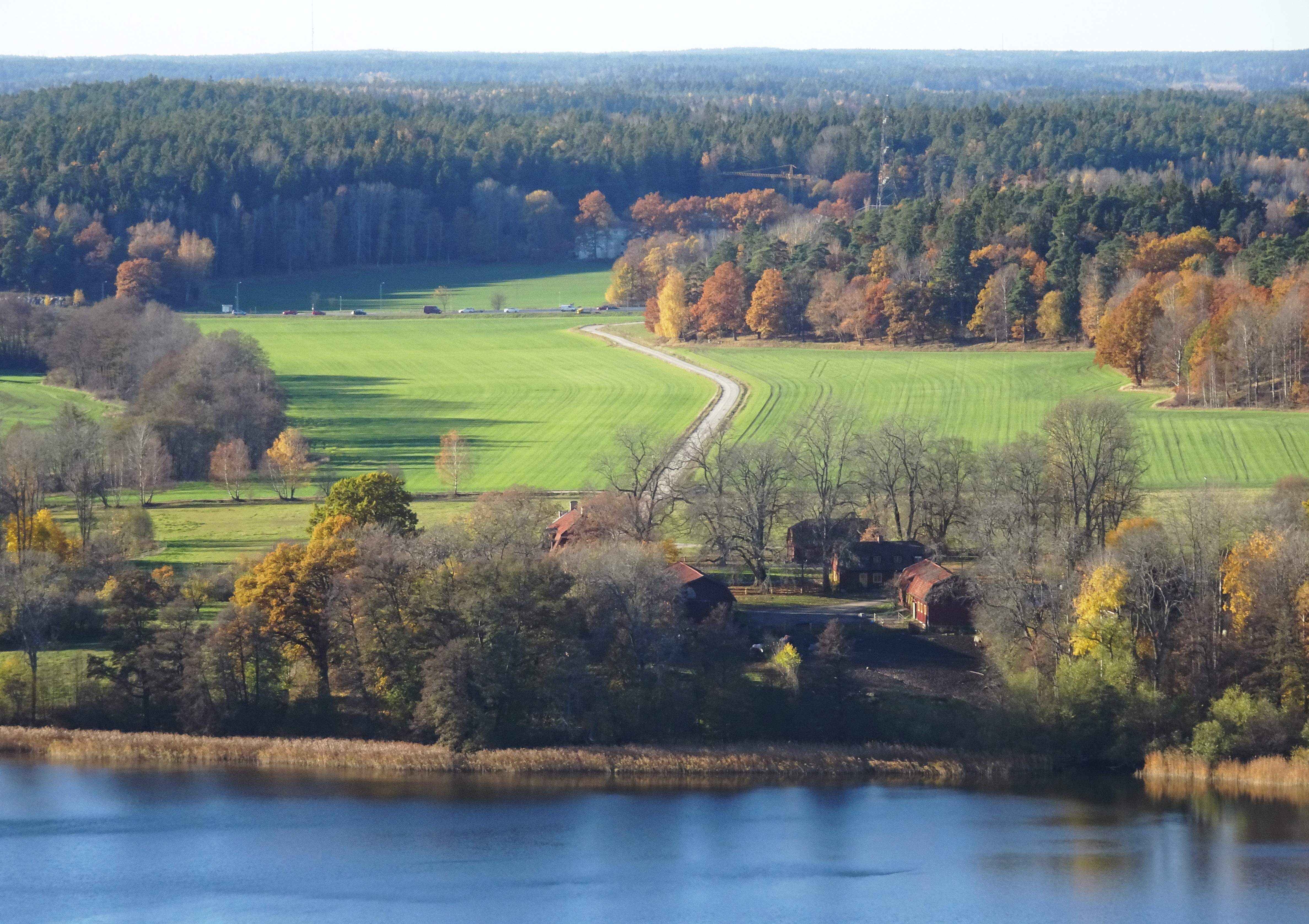 Älvesta gård med omgivning, vy från Flottsbrobacken